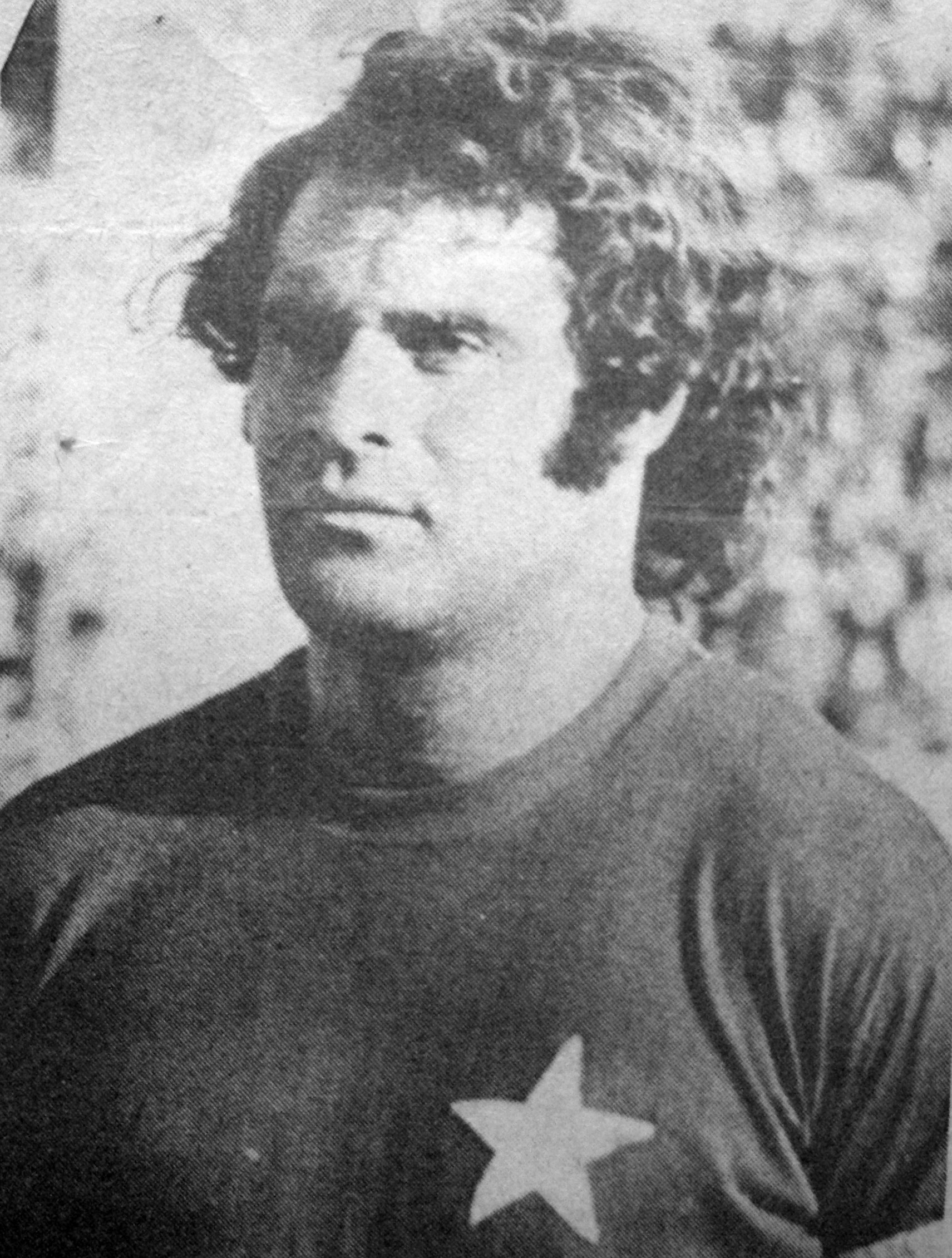 Mohsen Habacha, ancien joueur de l'Étoile du Sahel dans les années 1970